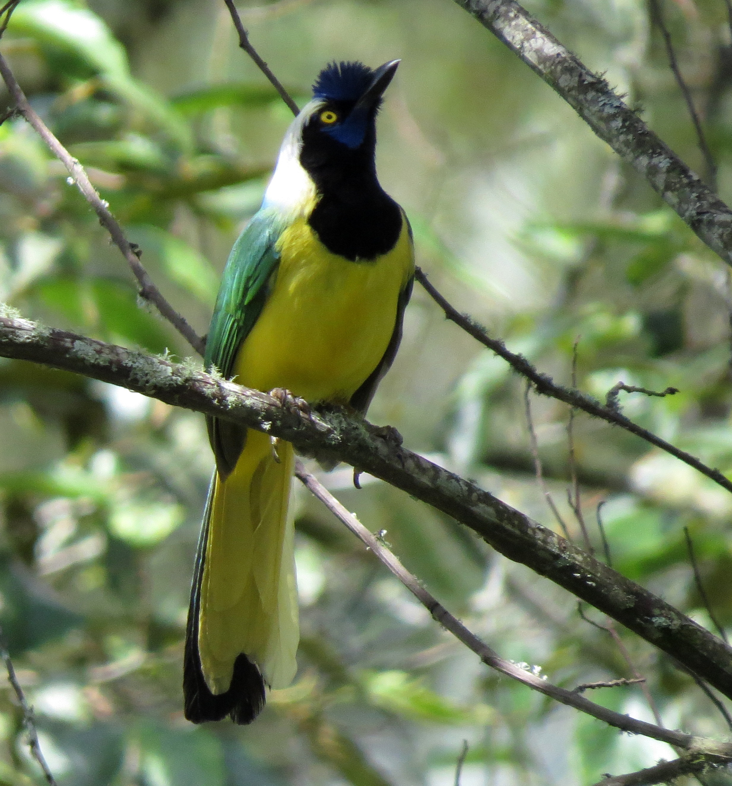 Cyanocorax incas (Carriquí de montaña)